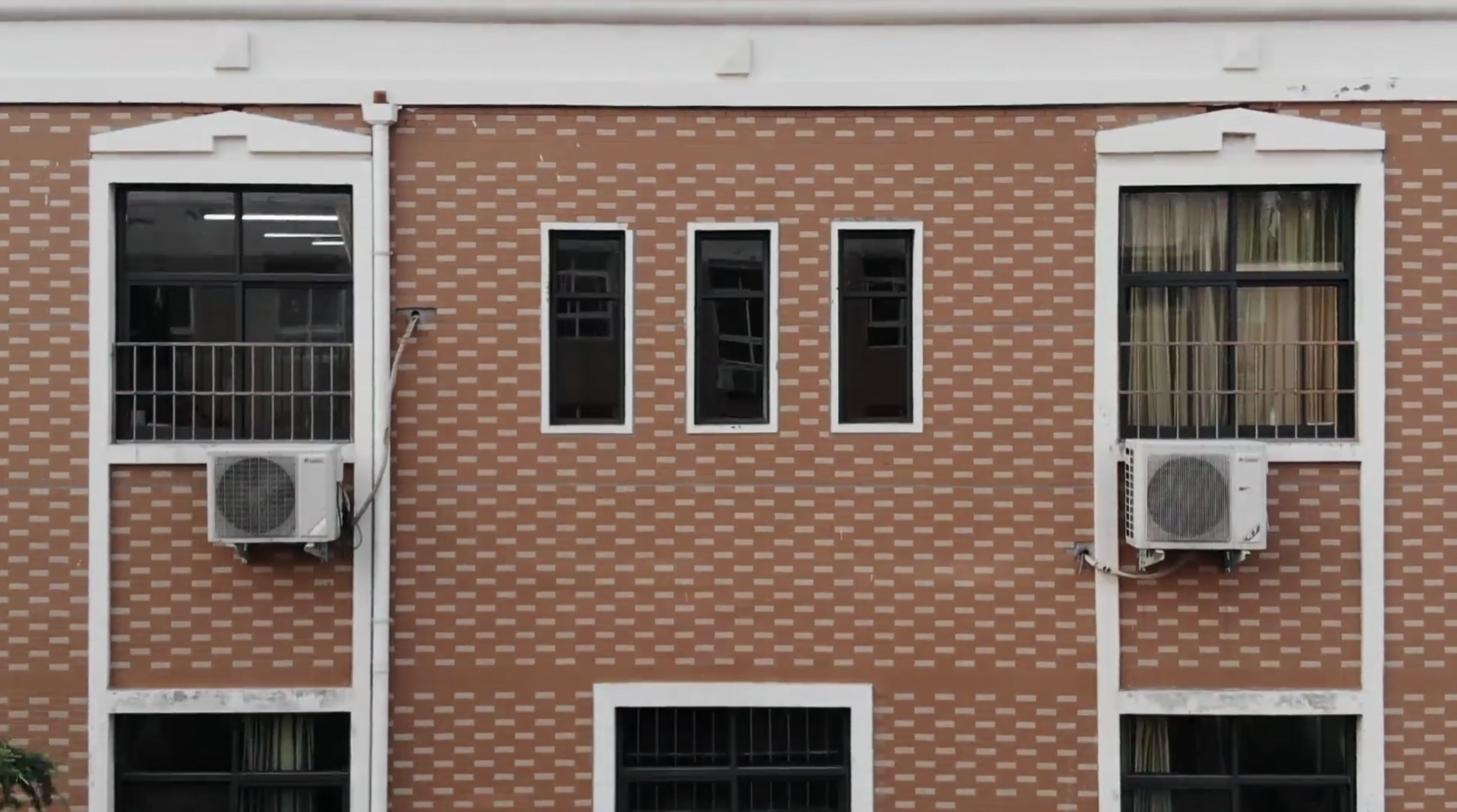 鄭州領航実験学校の建物の写真